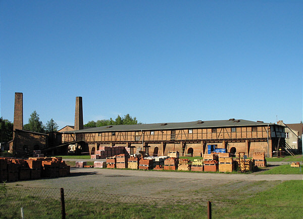 Ziegelei in Altglietzen auf der Neuenhagener Insel im Oderbruch